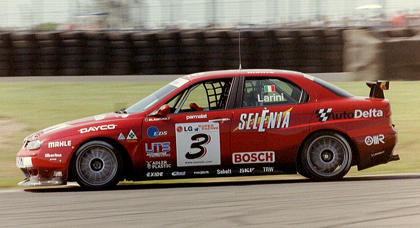 ETCC Donington 2003